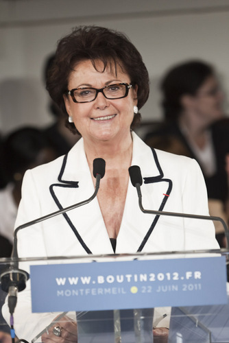 Discours de candidature à la présidentielle à Montfermeil (juin 2010)